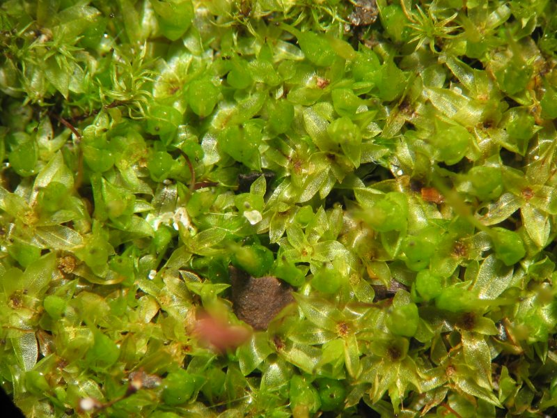 Punktiertes Wurzelsternmoos (Rhizomnium punctatum), weibliche Pflanzen